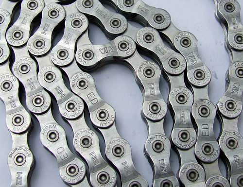 Łańcuch rowerowy Shimano Dura Ace (Shimano XTR)